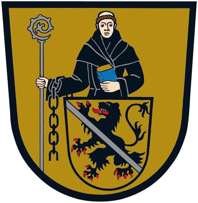 Wappen von Bas St. Leonhard im Lavanttal